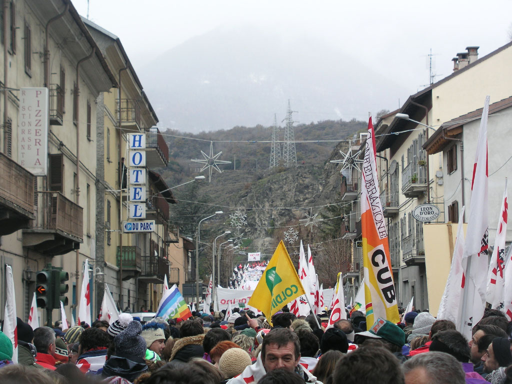 8 dicembre